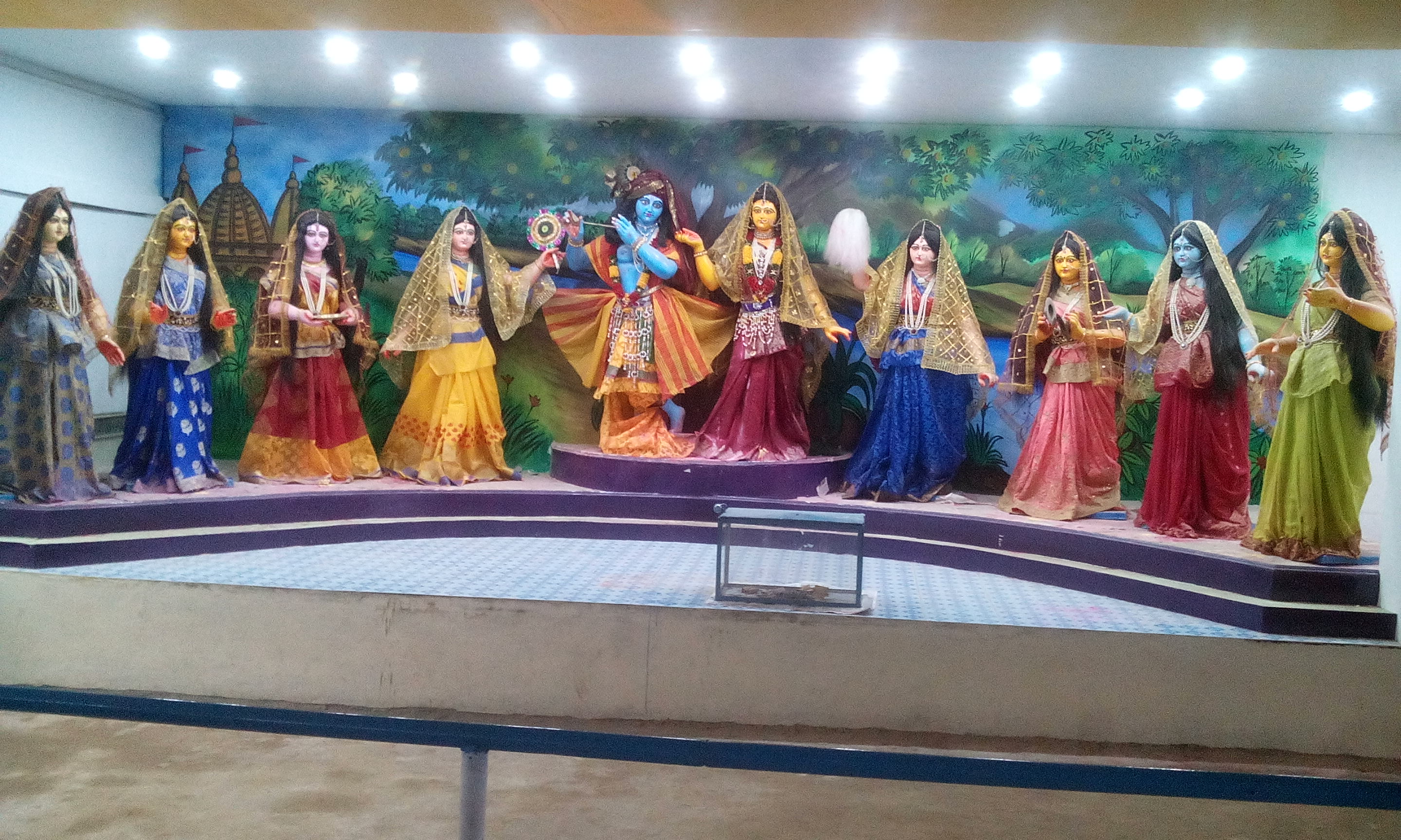 রাধা-কৃষ্ণকে অষ্টসখিরা পরিবেষ্টিত করে রয়েছে